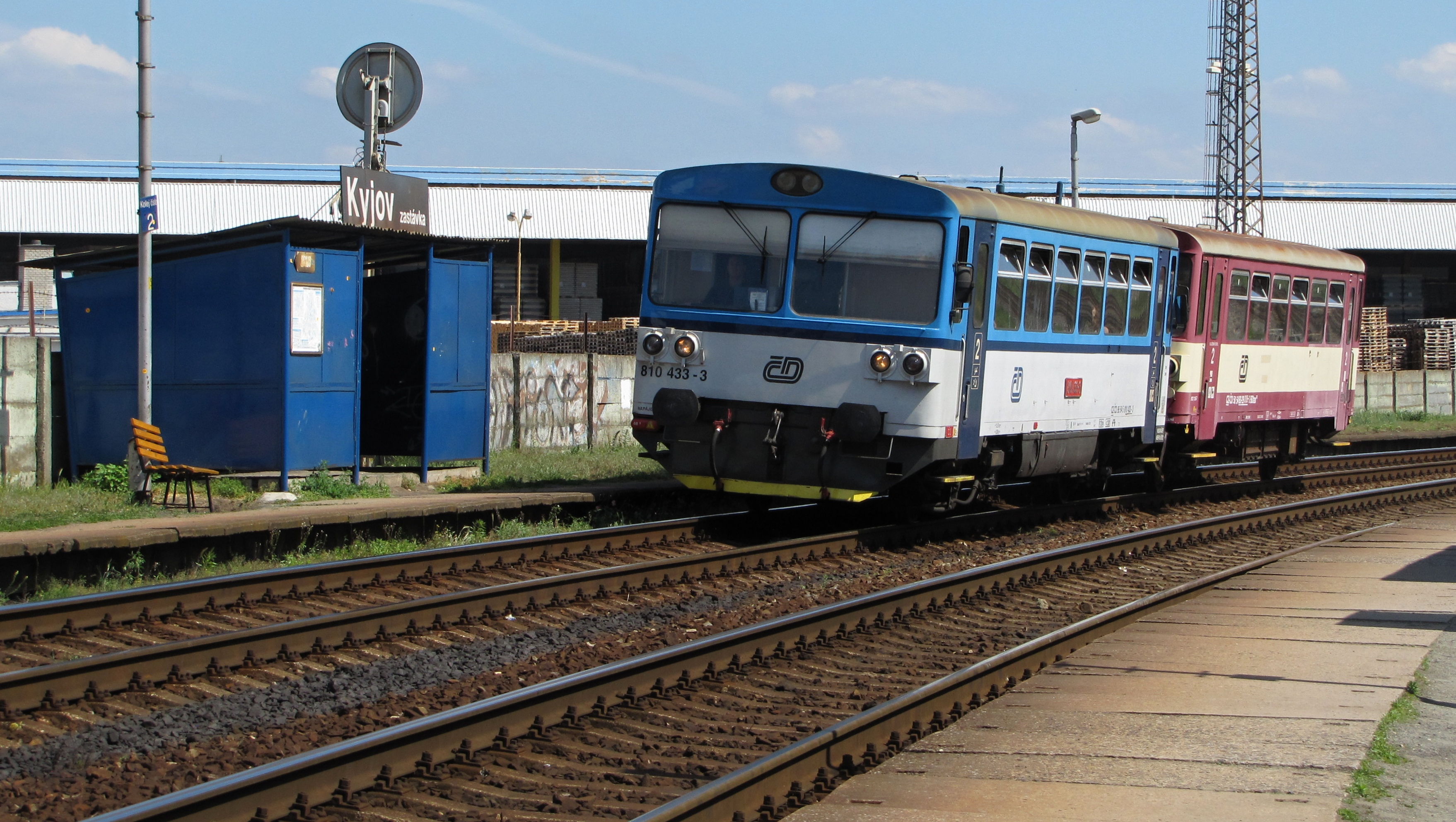 Železniční zastávka Kyjov na trati č. 340 (Vlárská dráha) ve směru od Veselí nad Moravou